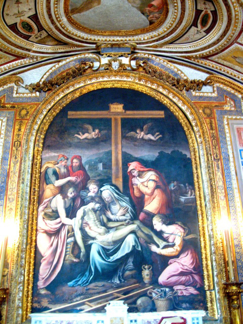 Wikipedia: Castel Capuano